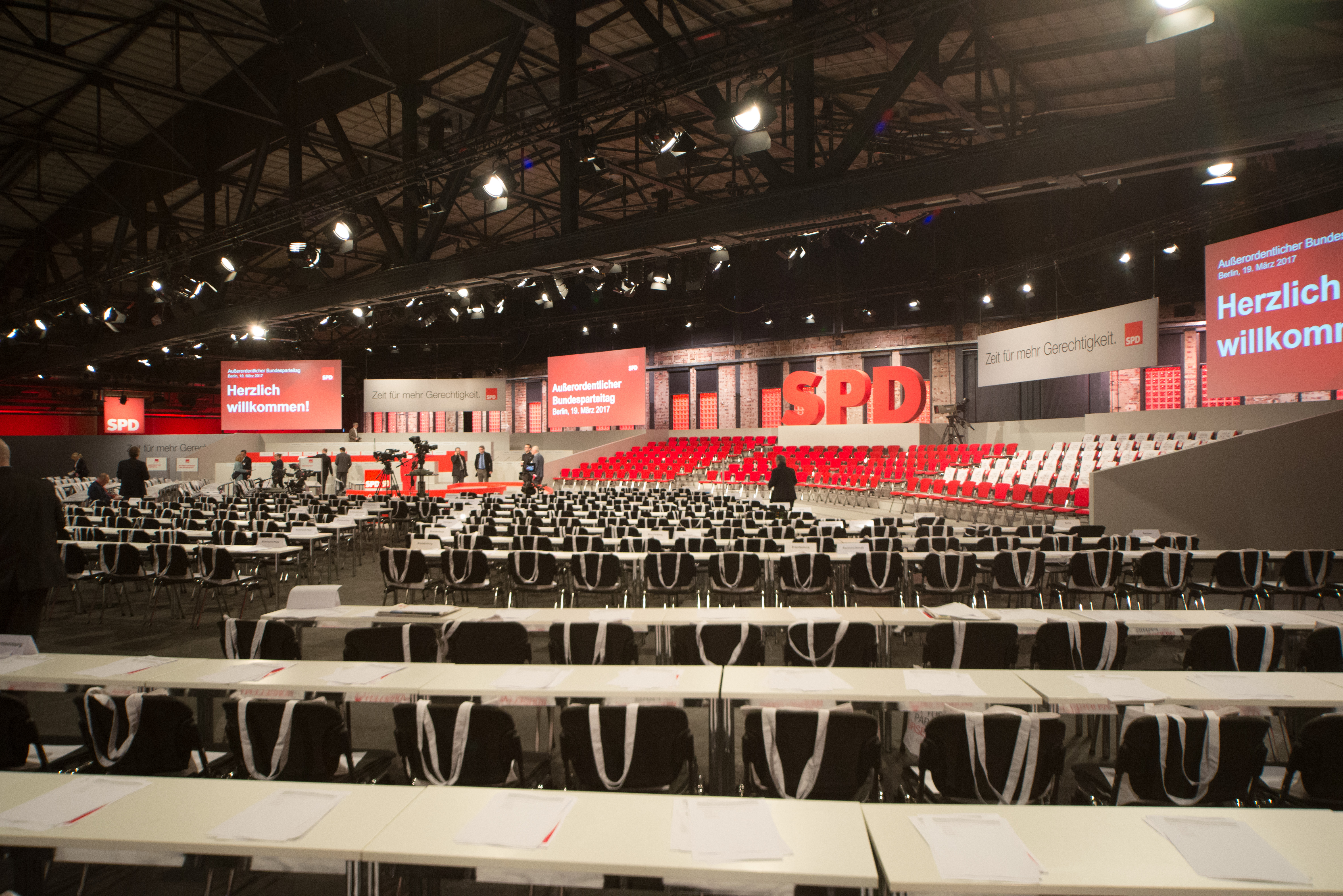 SPD Bundesparteitag am 19. März 2017 in Berlin